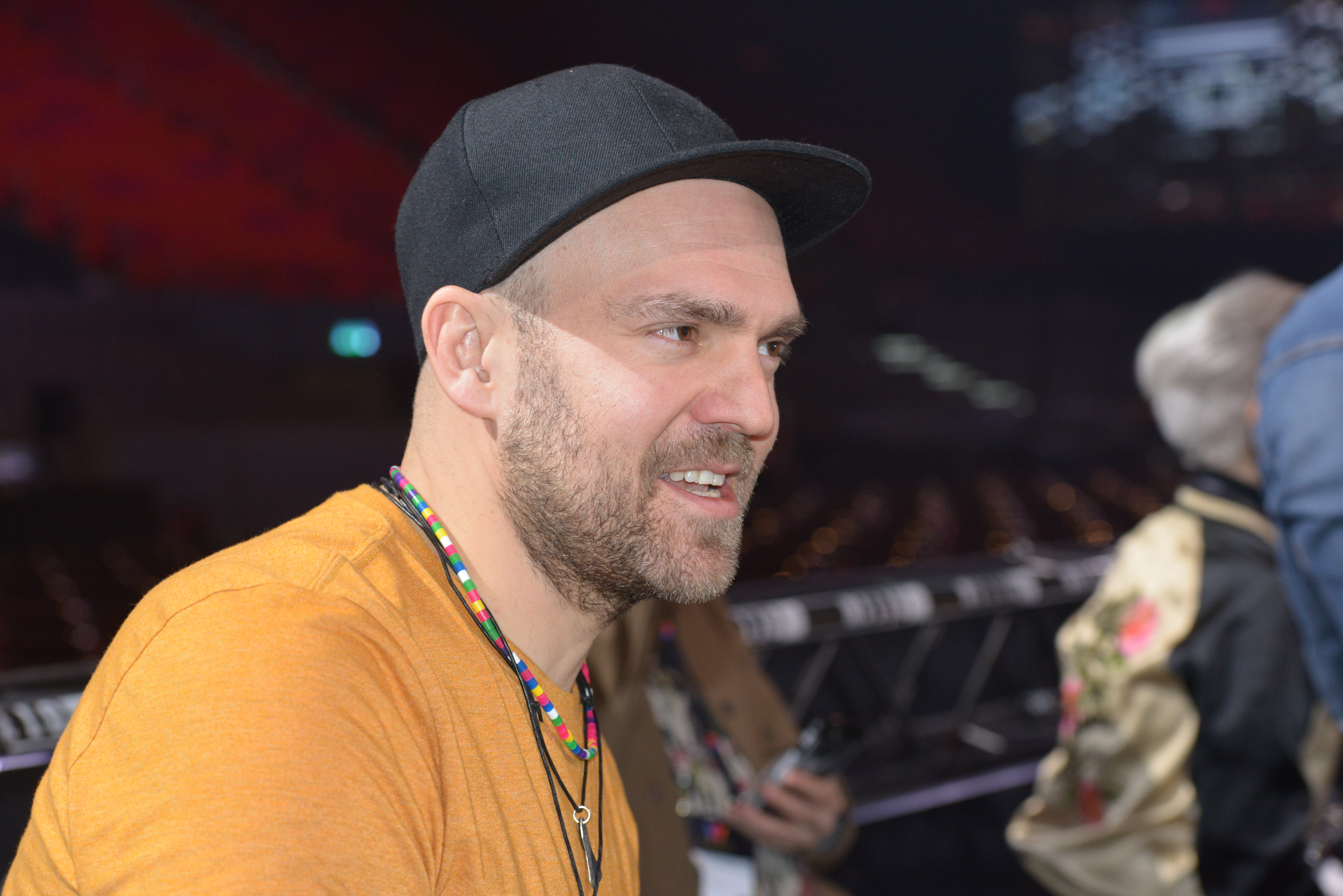 Melodifestivalen 2018, Presskonferens, Deltävling 2 , Scandinavium, Göteborg, Stiko Per Larsson